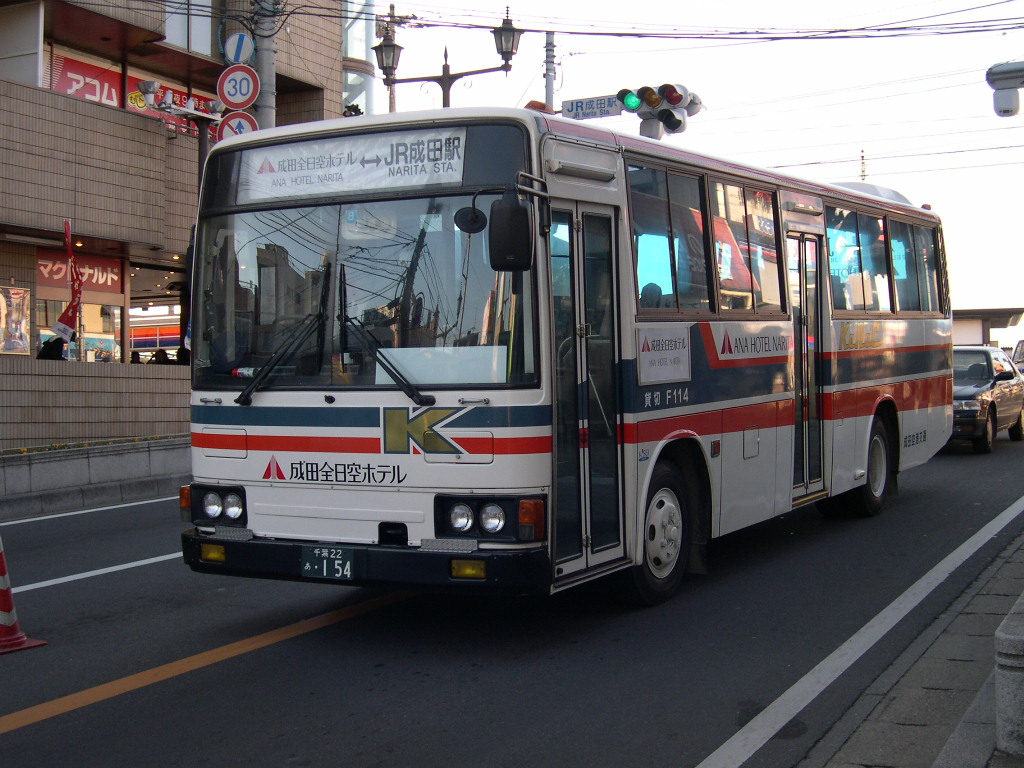 成田全日空ホテルシャトル ＪＲ成田駅前にて撮影